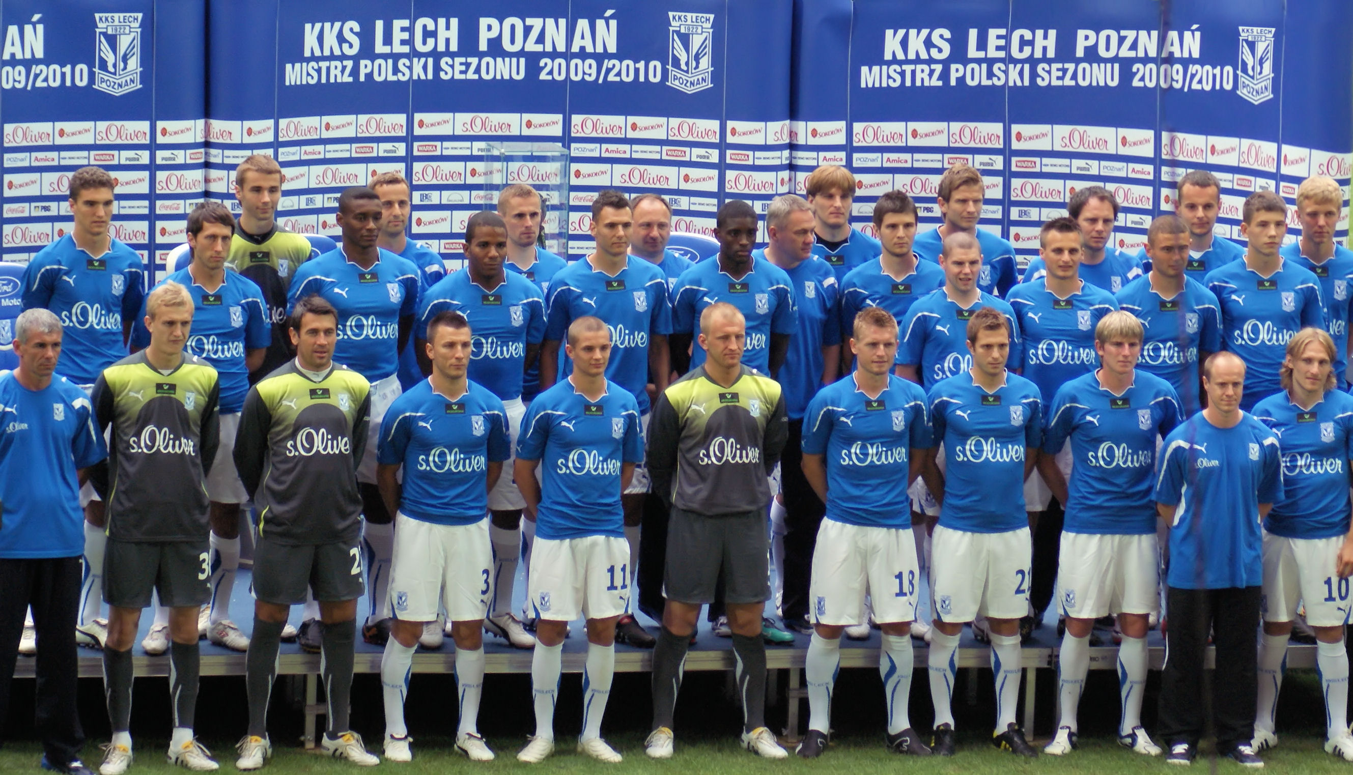 Lech Poznań - prezentacja piłkarzy na Stadionie Miejskim przed sezonem 2009/10.